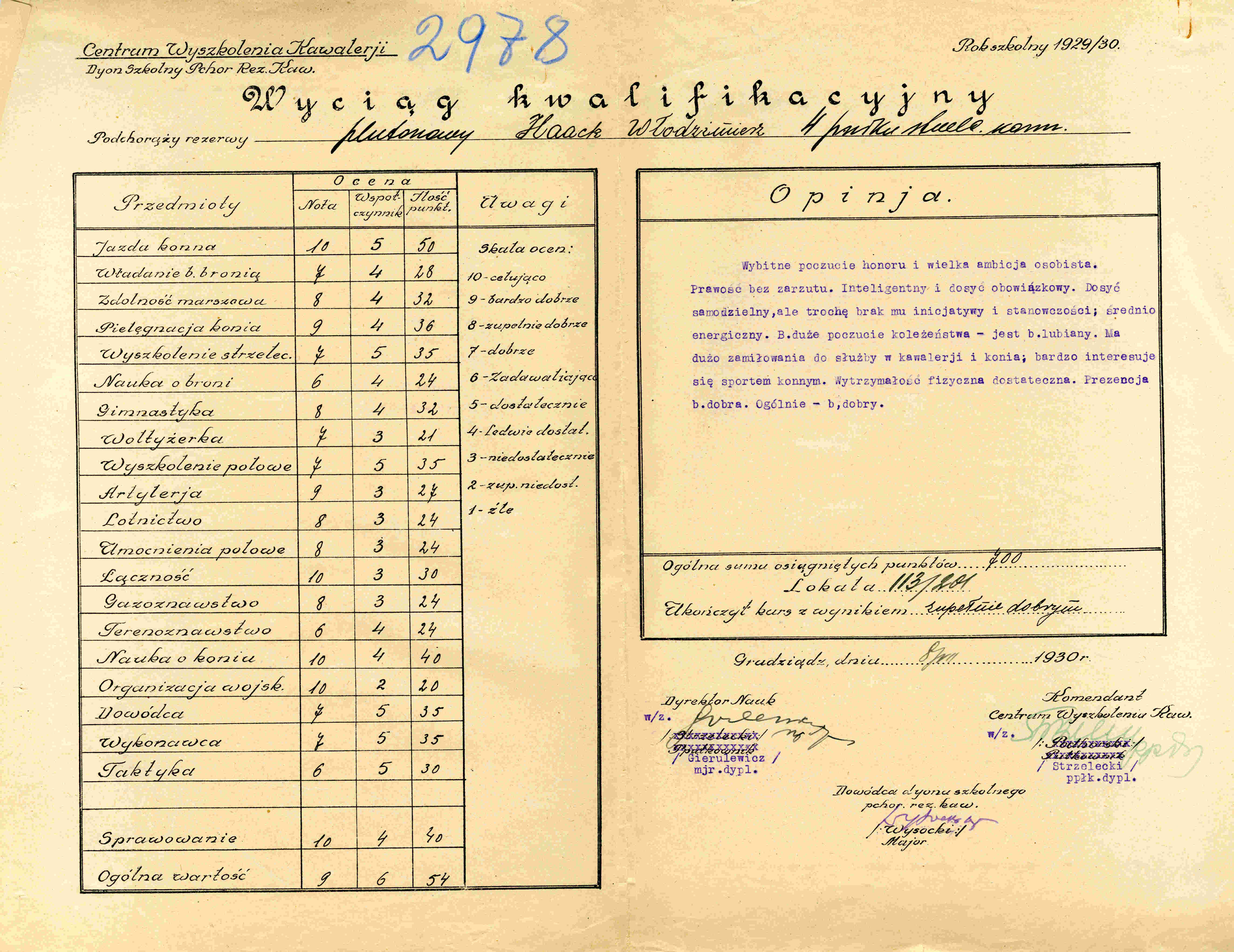 Centrum Wyszkolenia Kawalerii - Włodzimierza Haack - wyciąg kwalifikacyjny absolwenta Szkoły Podchorążych Rezerwy Kawalerii